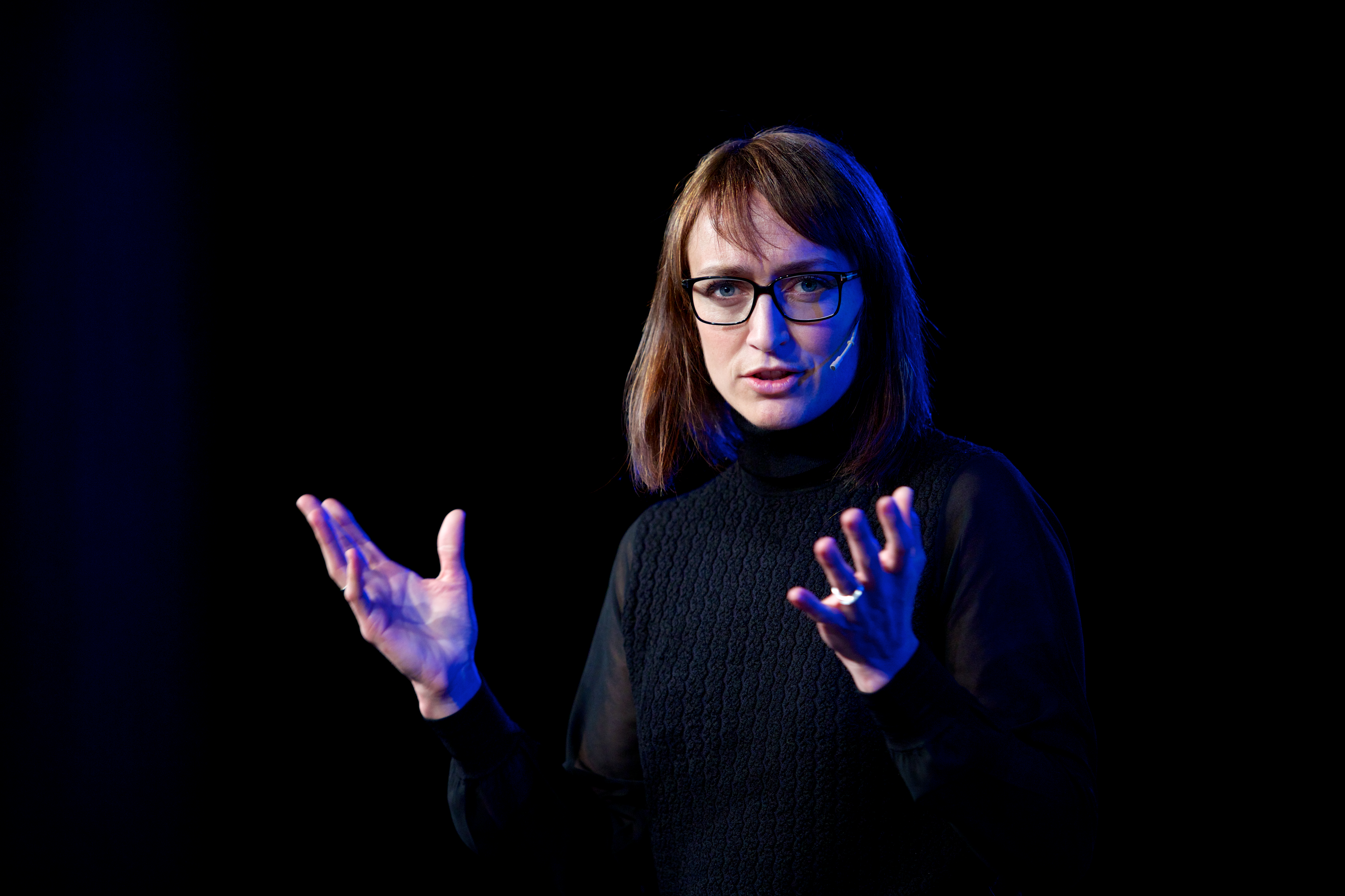 Medvirkende: Louise Roug (Mashable), Ingerid Stenvold (NRK).